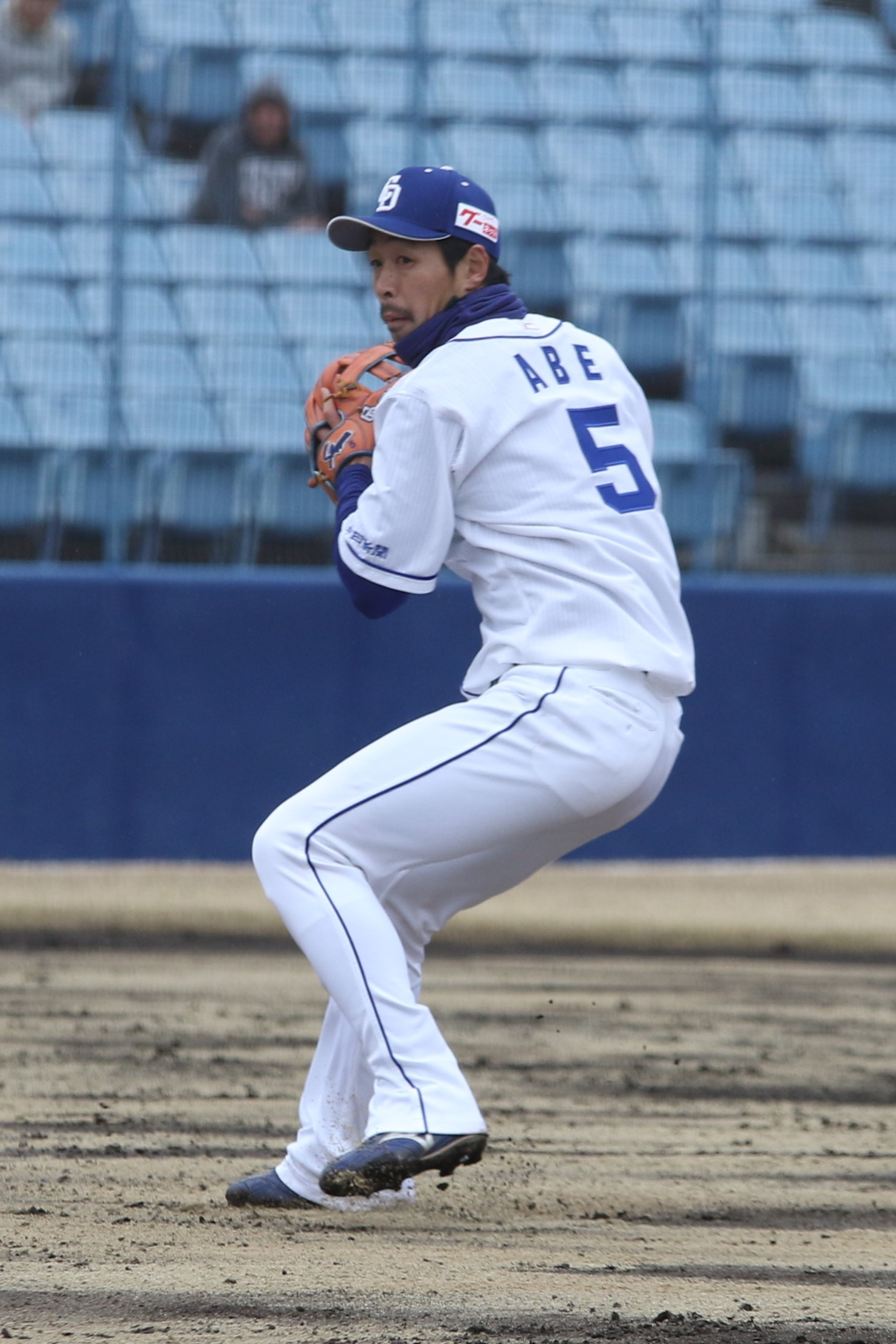 2019年3月17日、ナゴヤ球場にて